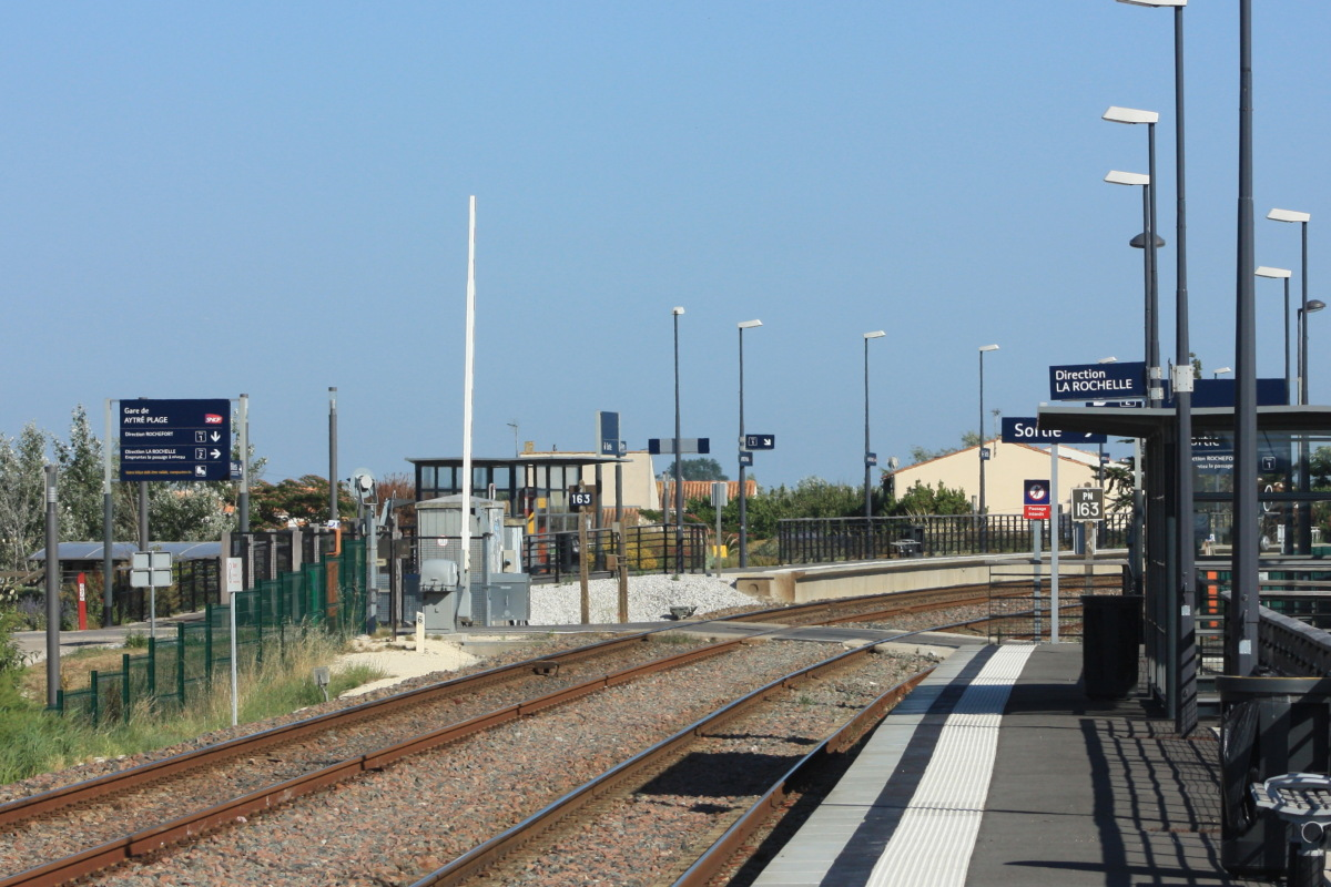 Vue des quais de la gare d'Aytré, en direction de Saintes.